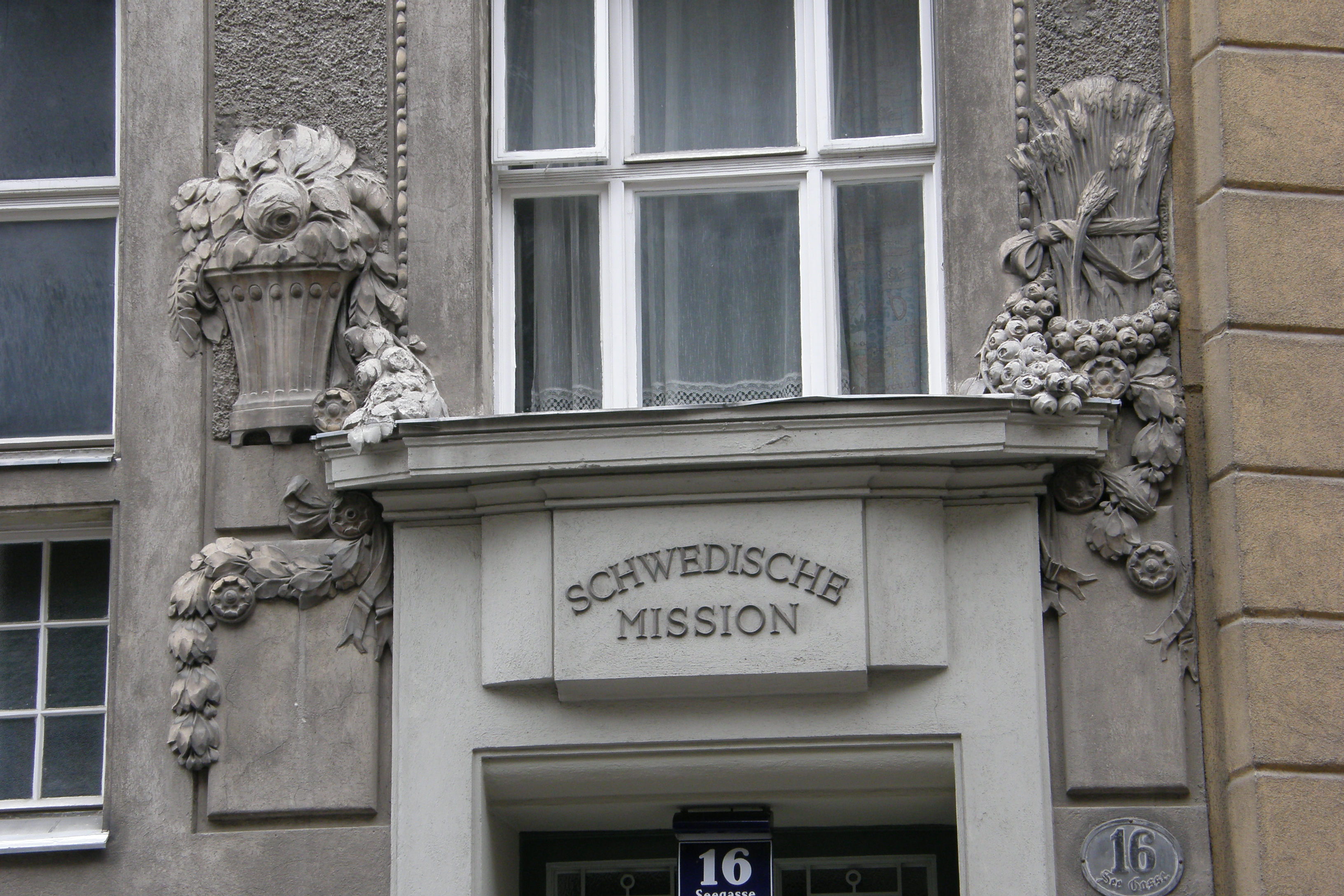 Messiaskapelle